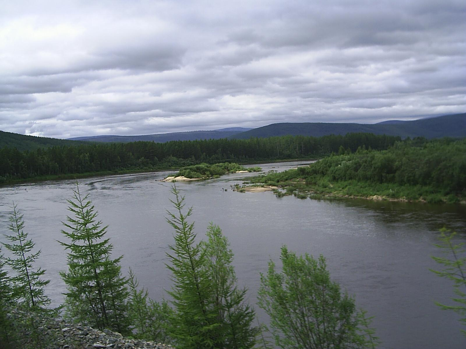 Снято из окна вагона поезда Москва - Тында